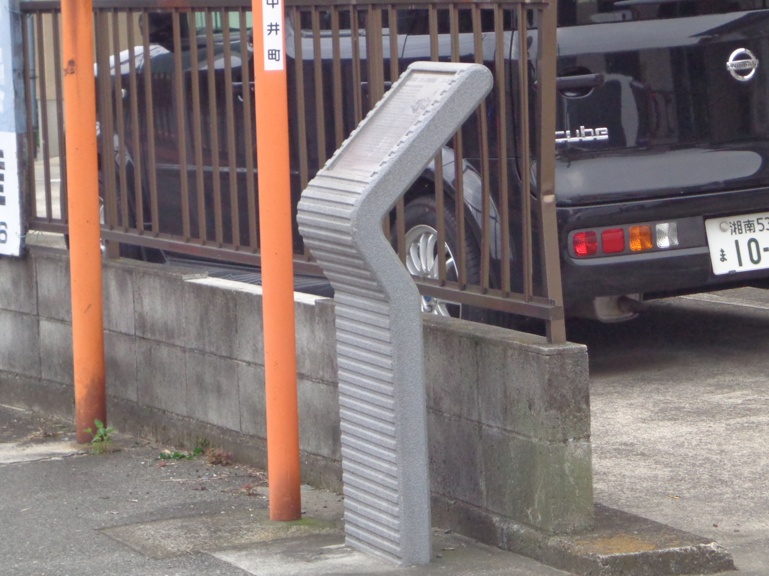 湘南軌道上井ノ口駅跡１